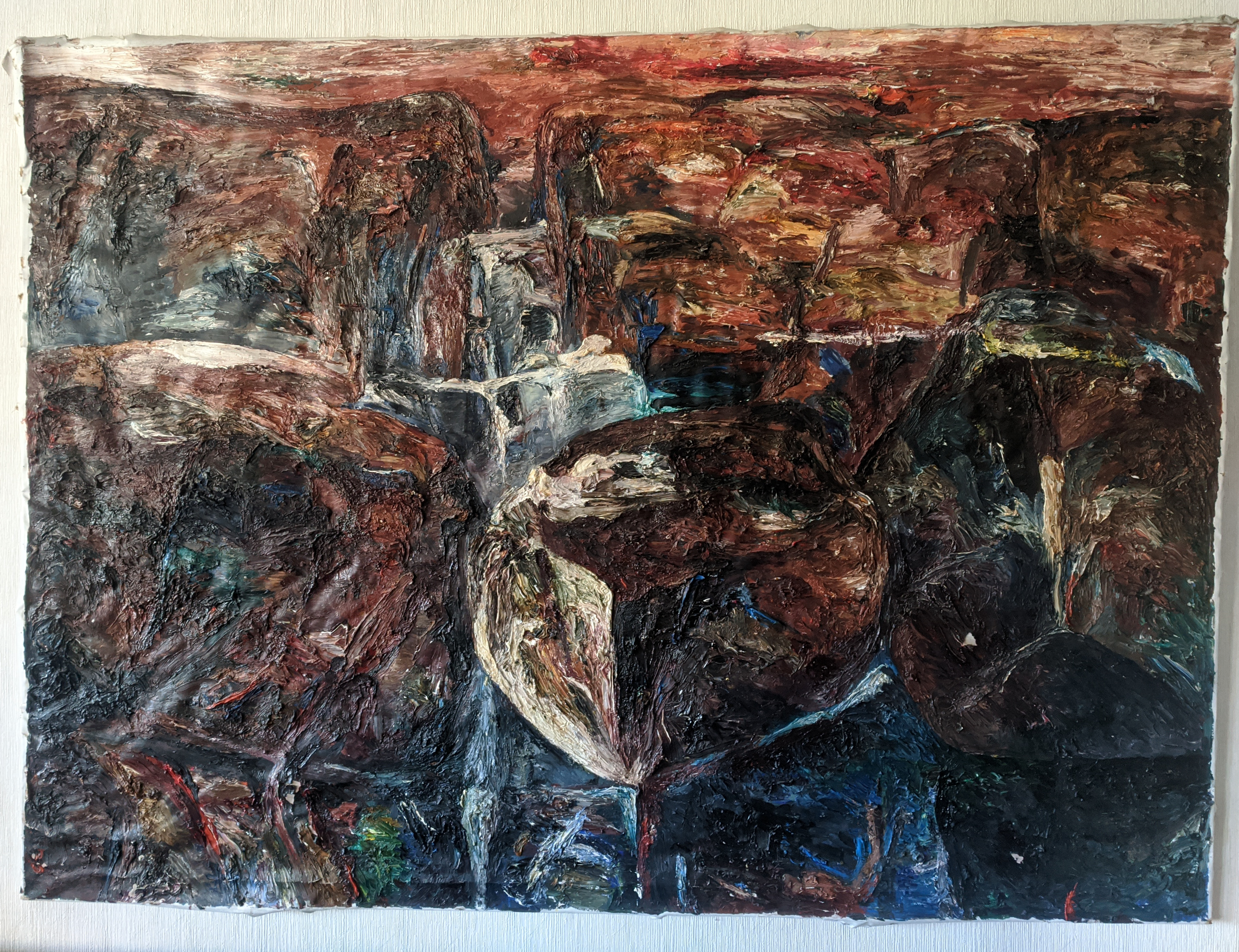 Verk av Berta Marie Svensson, i privat ägo